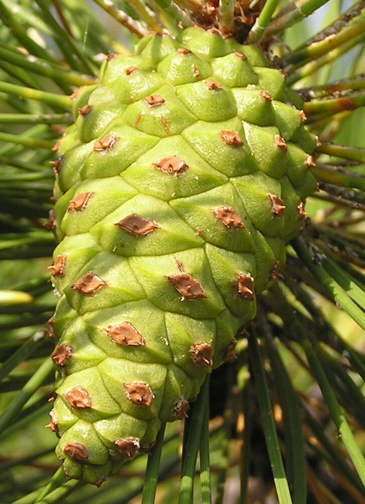 Растение